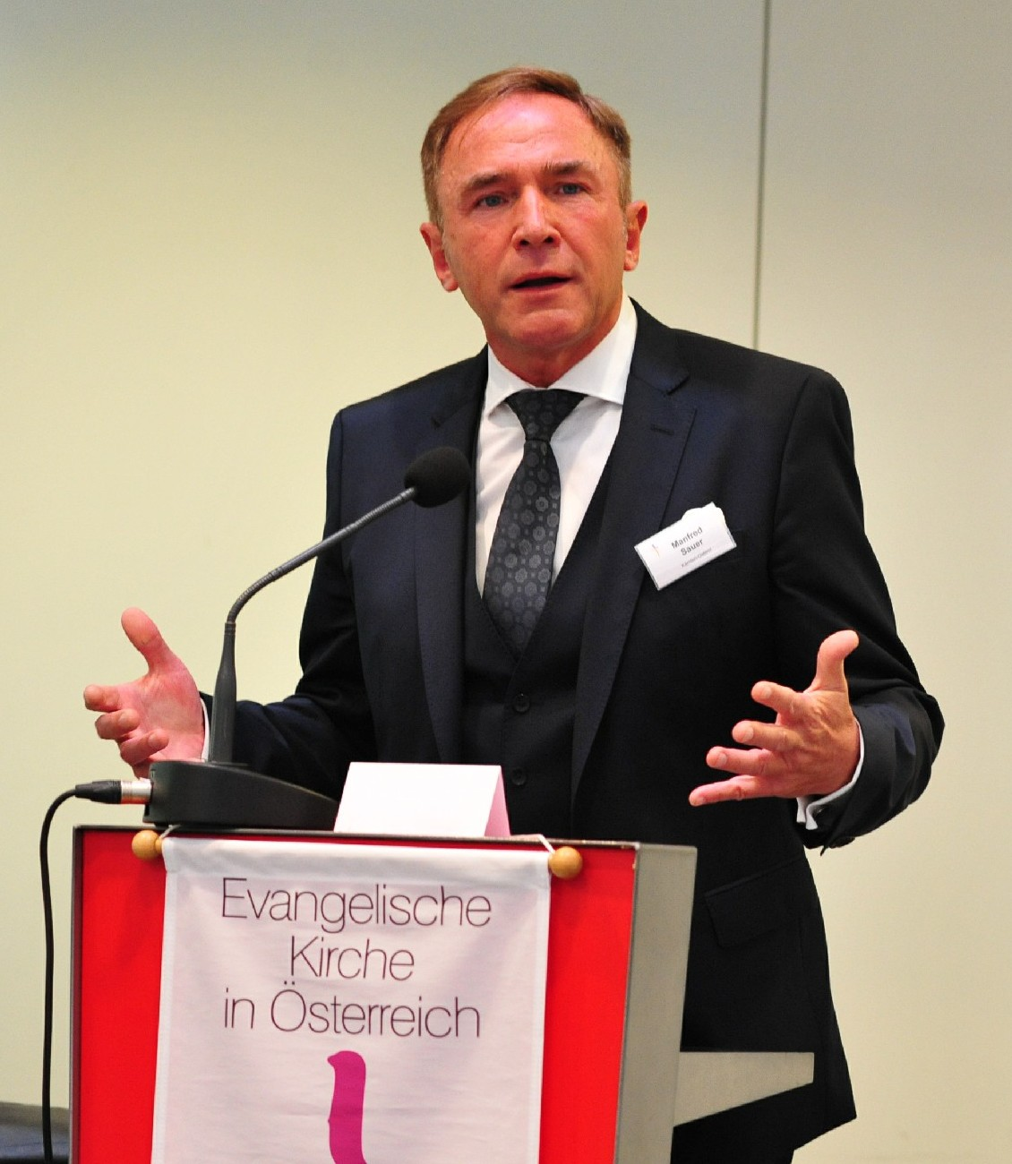 190504_SynodeBischofswahl_epdUschmann_148